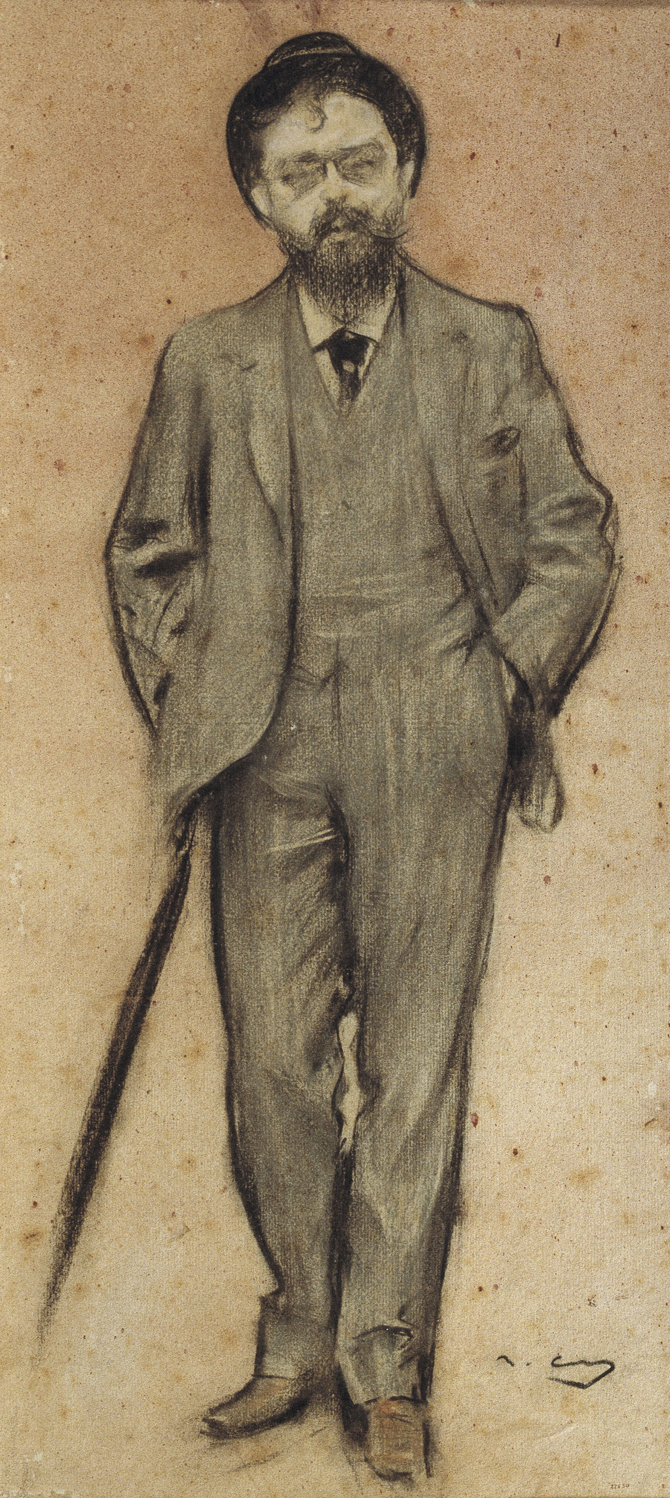 Isaac Albéniz. Portrait by Ramon Casas.